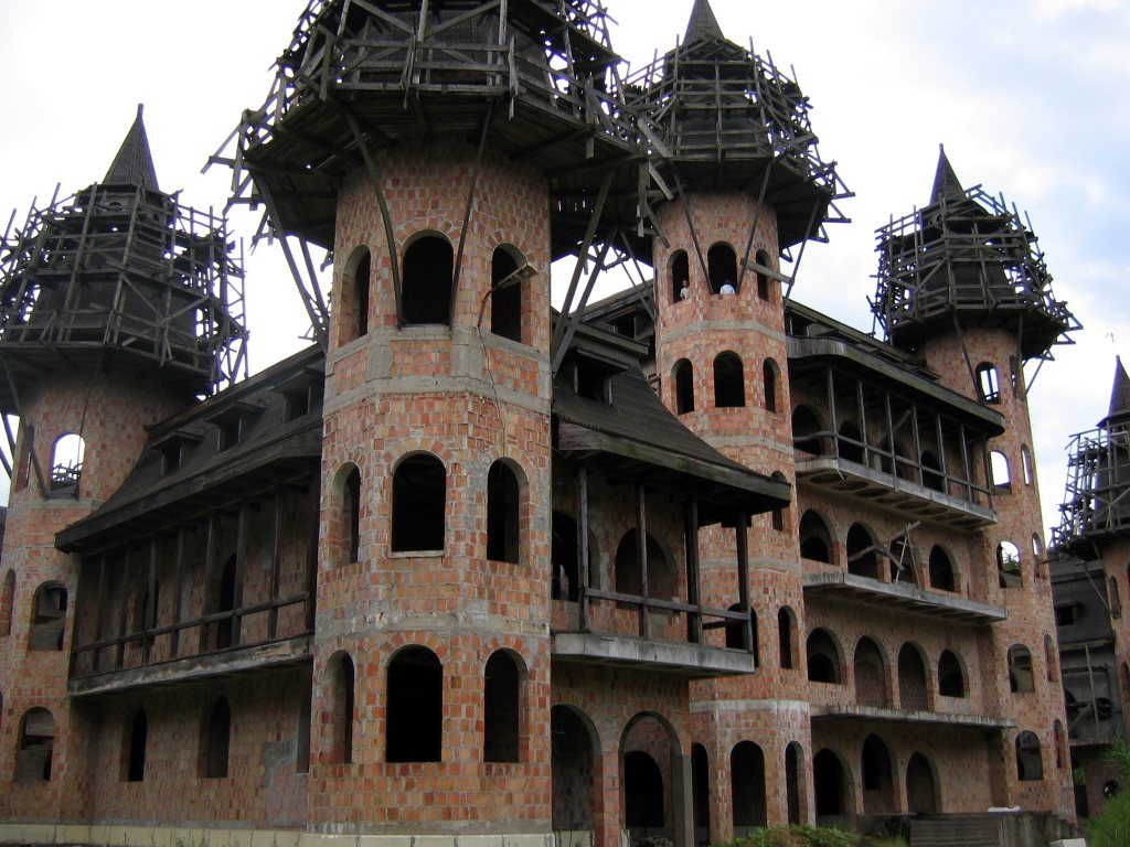 Castle in Łapalice near Kartuzy, Pomorskie Poland Buildings started in 1979, not finished till now. Zamek w Łapalicach, koło Kartuz. Budowa zaczęta przez Gdańskiego rzemieślnika w 1979, wciąż nie skończony. Rafikk